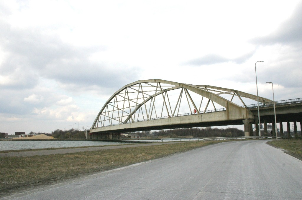 Bréck vu Genk.